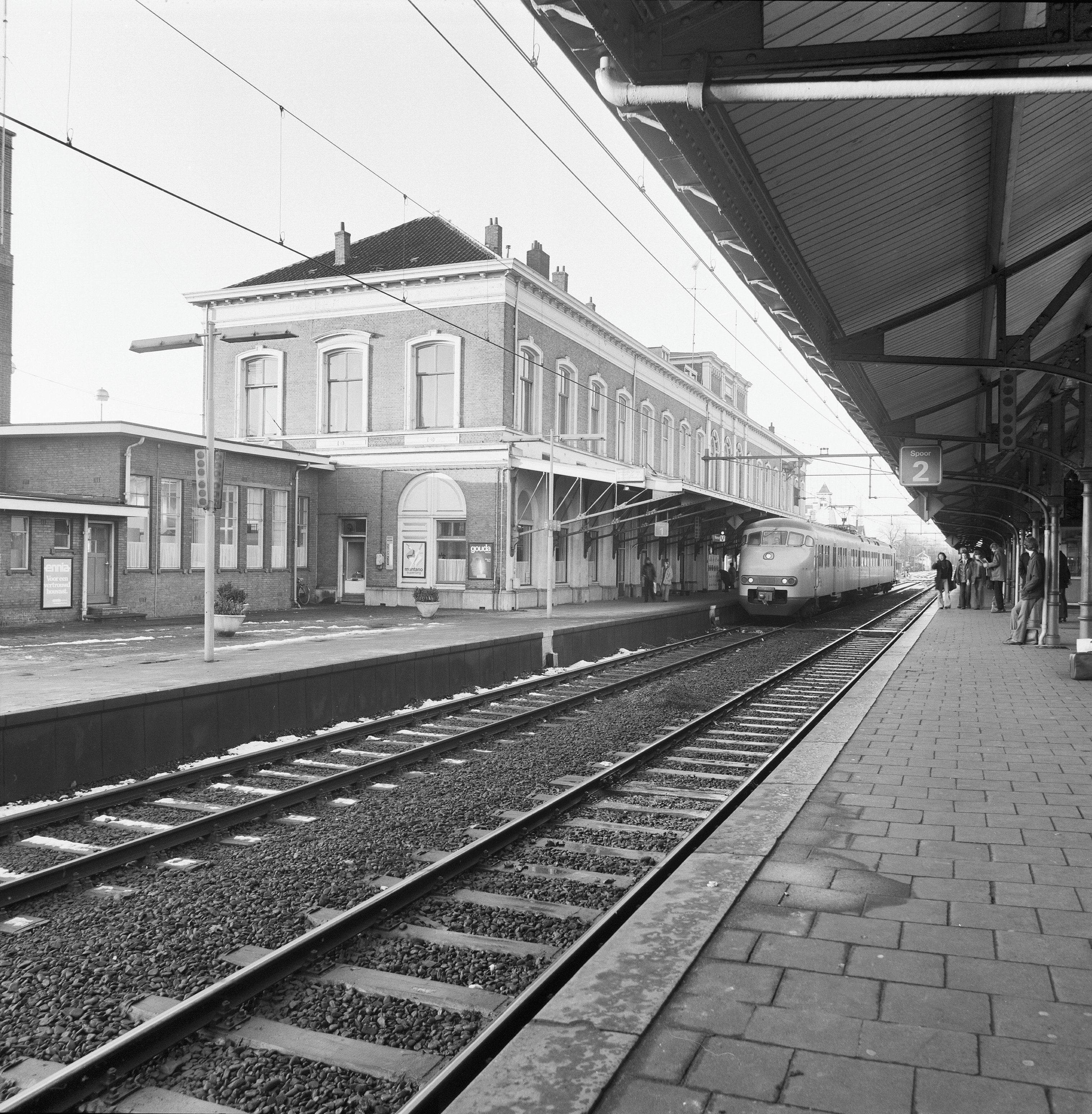 Station Hilversum: perronzijde